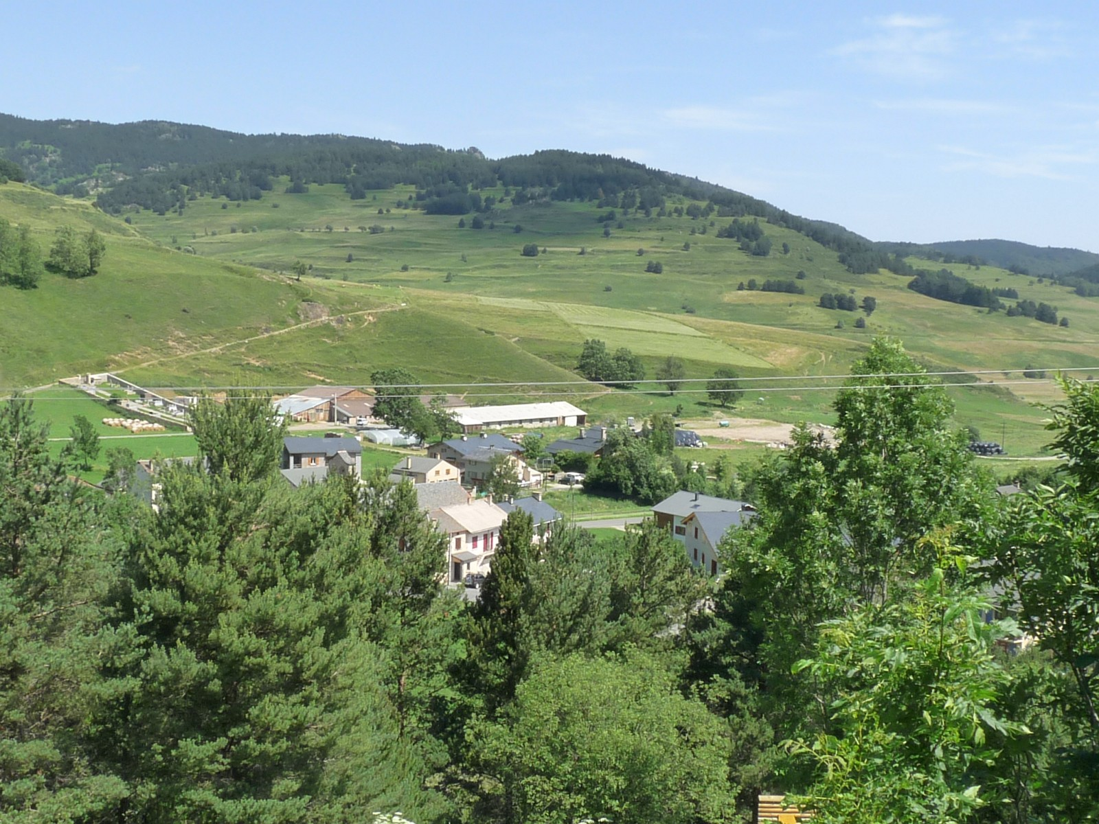 Fontrabiouse, Pyrénées-Orientales, France